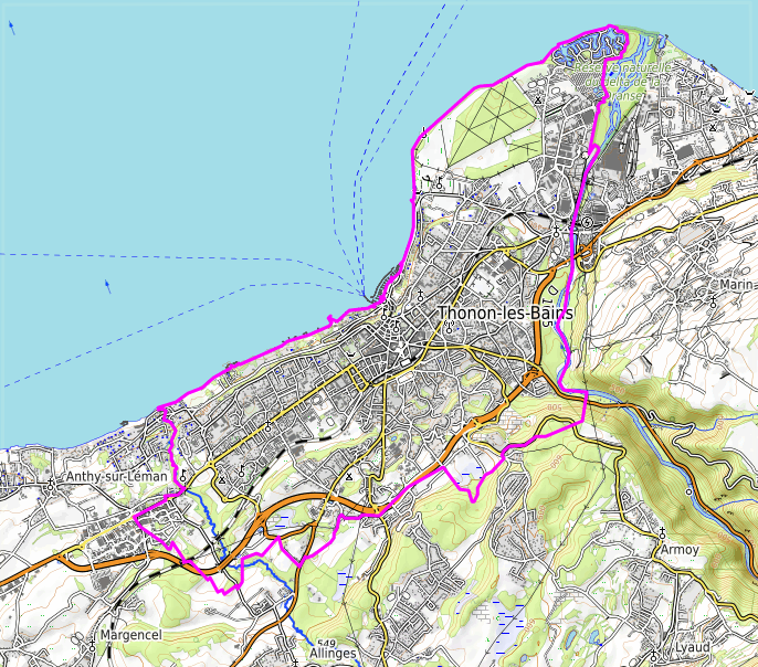 carte réalisée sur umap This map may be incomplete, and may contain errors. Don't rely solely on it for navigation.